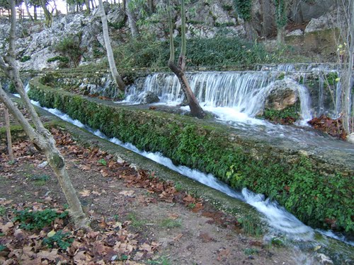 Nacimiento de Agua